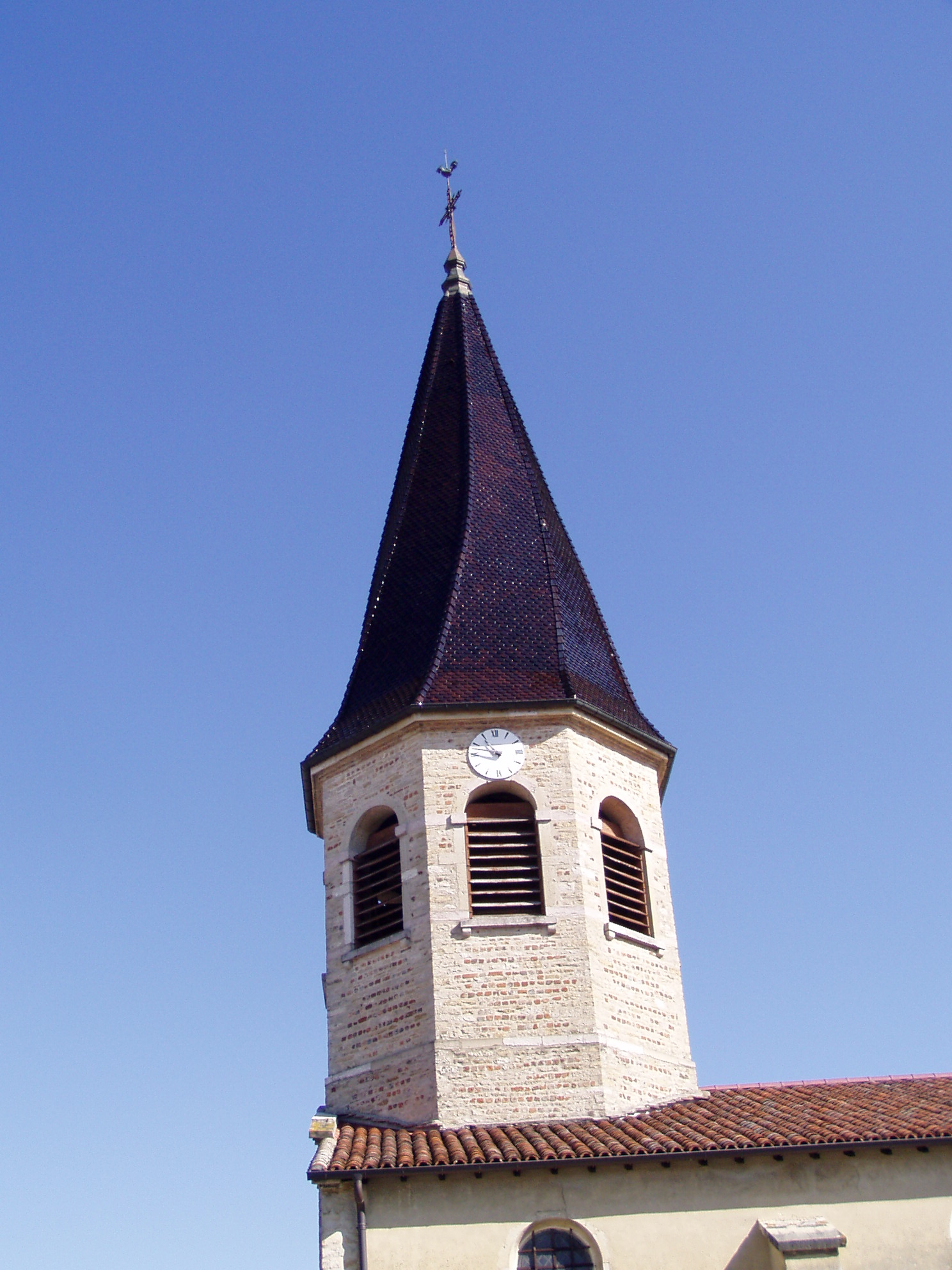 Clocher tors de l'église Saint Loup d'Attignat (Ain)